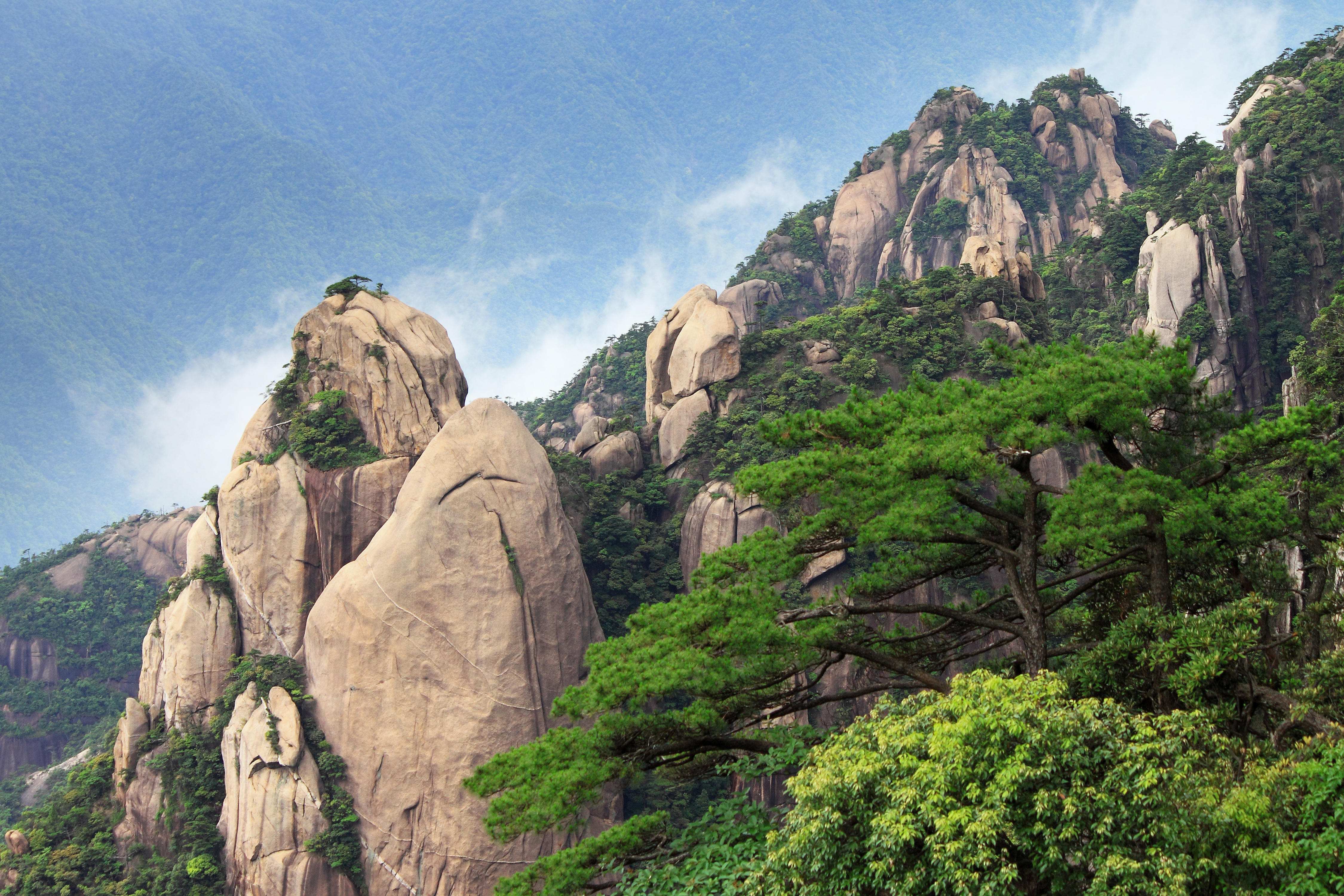 三清山 ——摄于西海岸